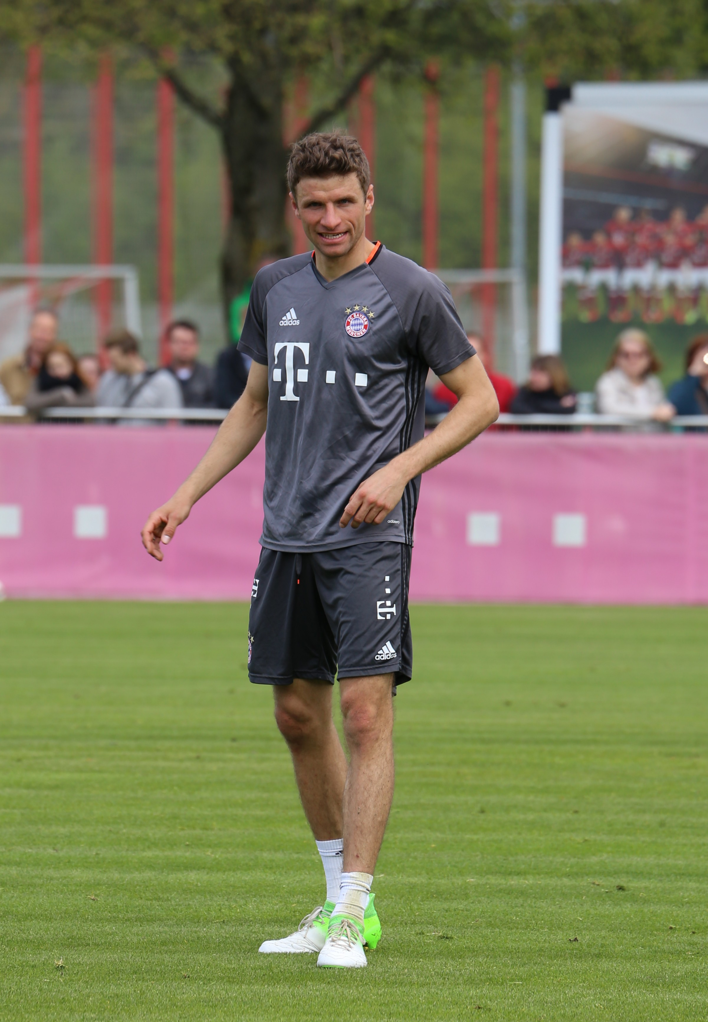 Thomas Müller, am 3. Mai 2017 beim Training auf dem Gelände des FC Bayern München